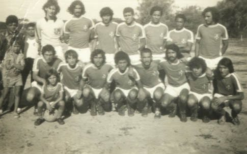 Sport Club Tabira em 1974, ainda com as cores azul e escudo vermelho.